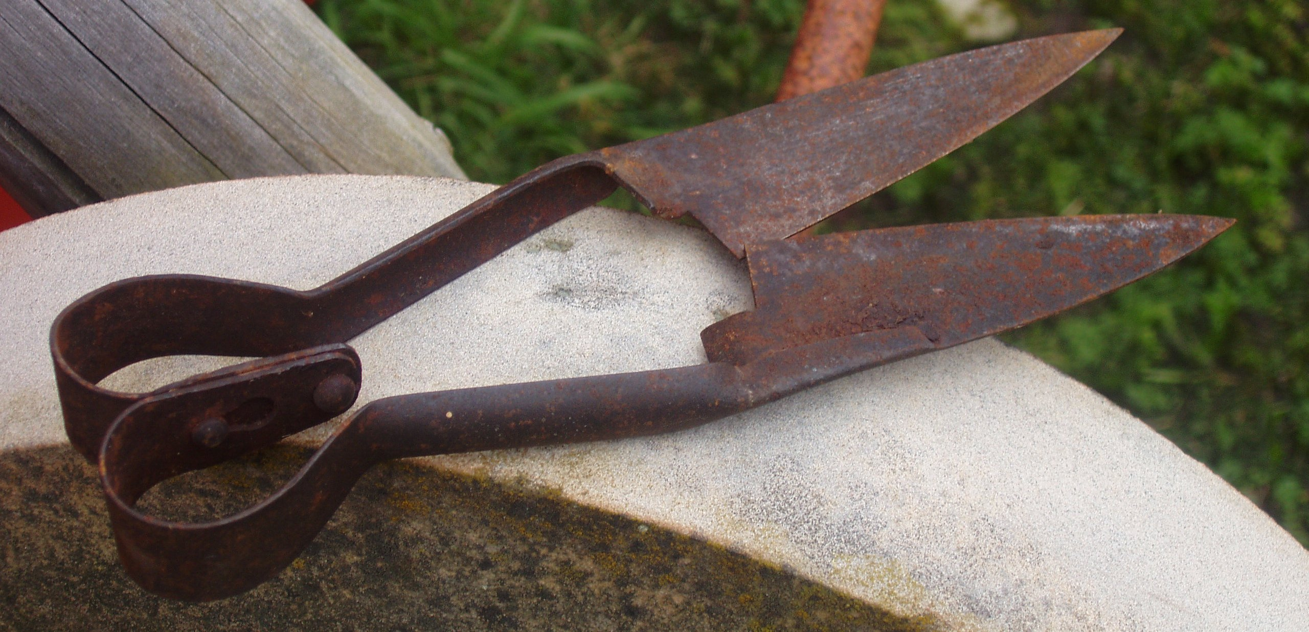 Sausaks